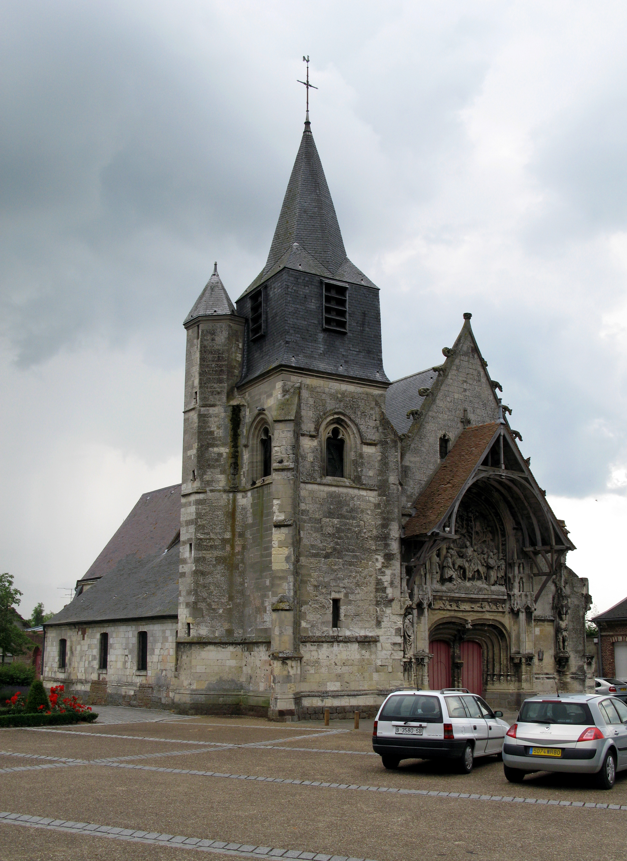 La Neuville-sous-Corbie, hameau de Corbie (Somme, France) - Eglise. .